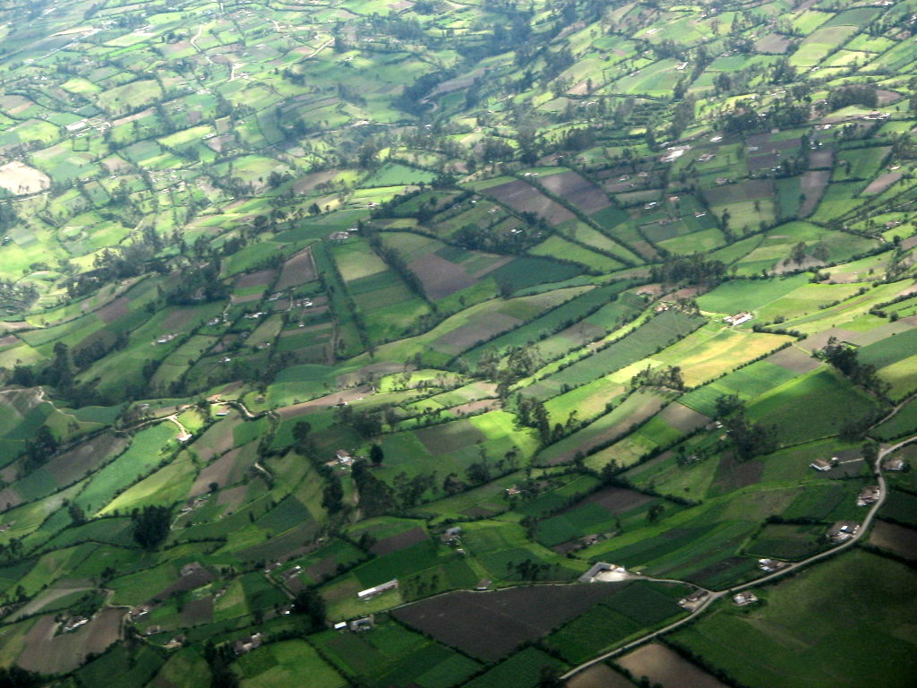 Foto aerea de Ipiales. Autor: Luis Eduardo Bernal M.